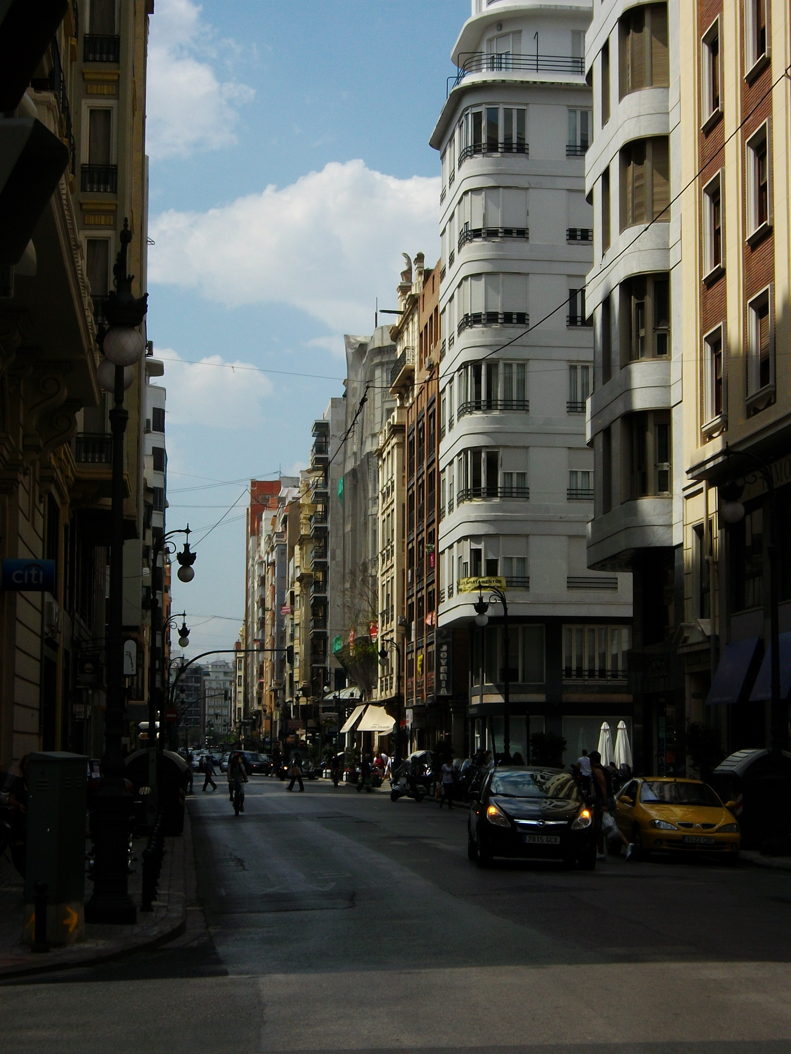 Carrer de sant Vicent de València, l'Horta, País Valencià.